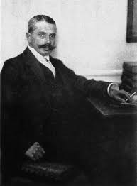 Штерн Эрнст Романович (1859 – 1924) – историк и археолог. Фото 1900-х